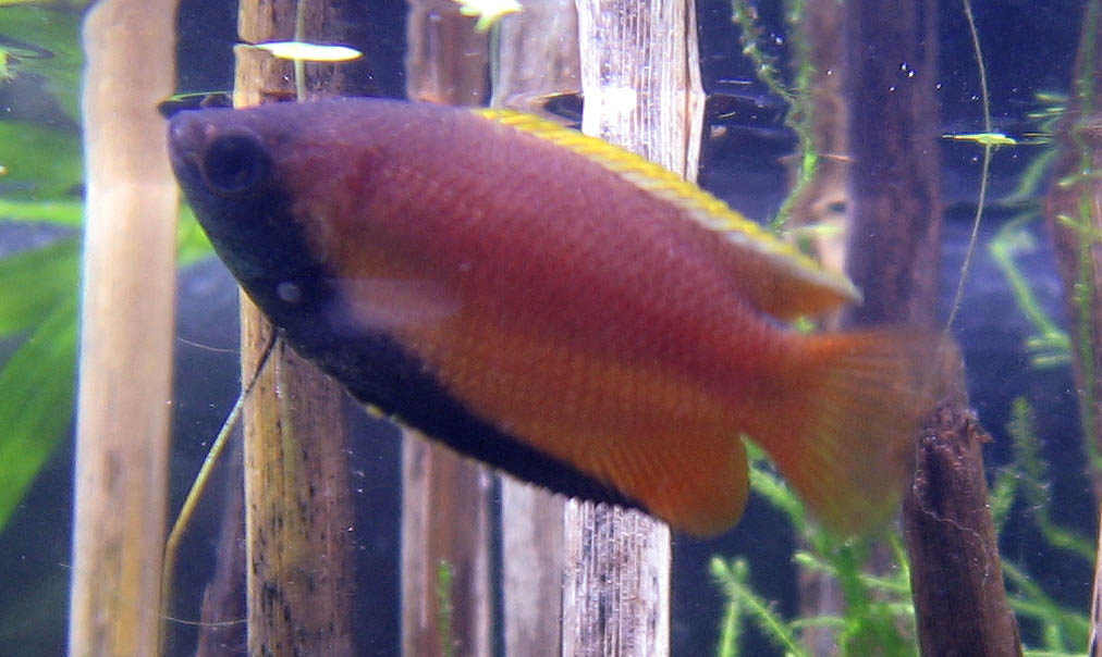 Honiggurami